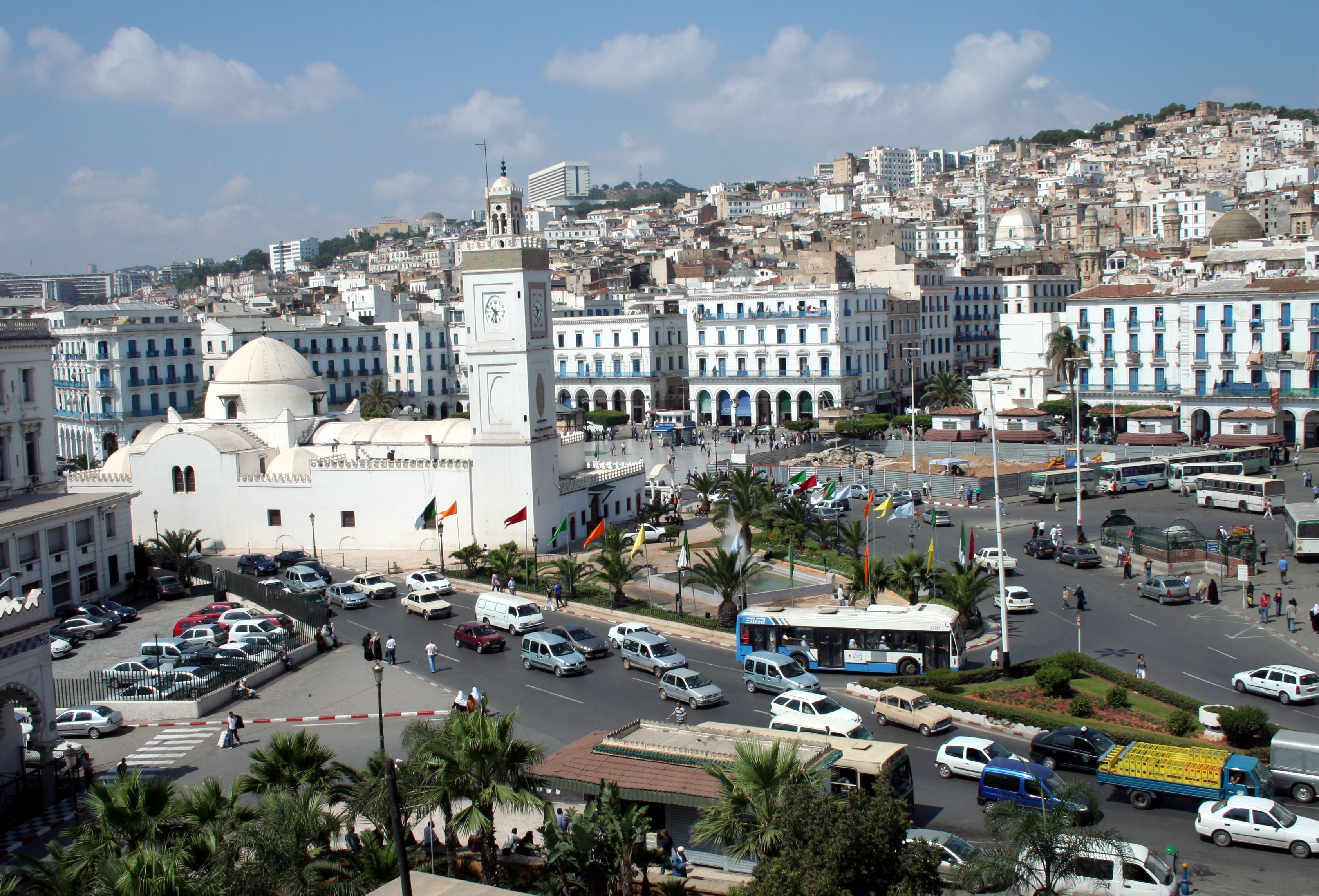 Alger, « Nouvelle Mosquée », Place des Martyrs (anciennement Place du Gouvernement) et Casbah.